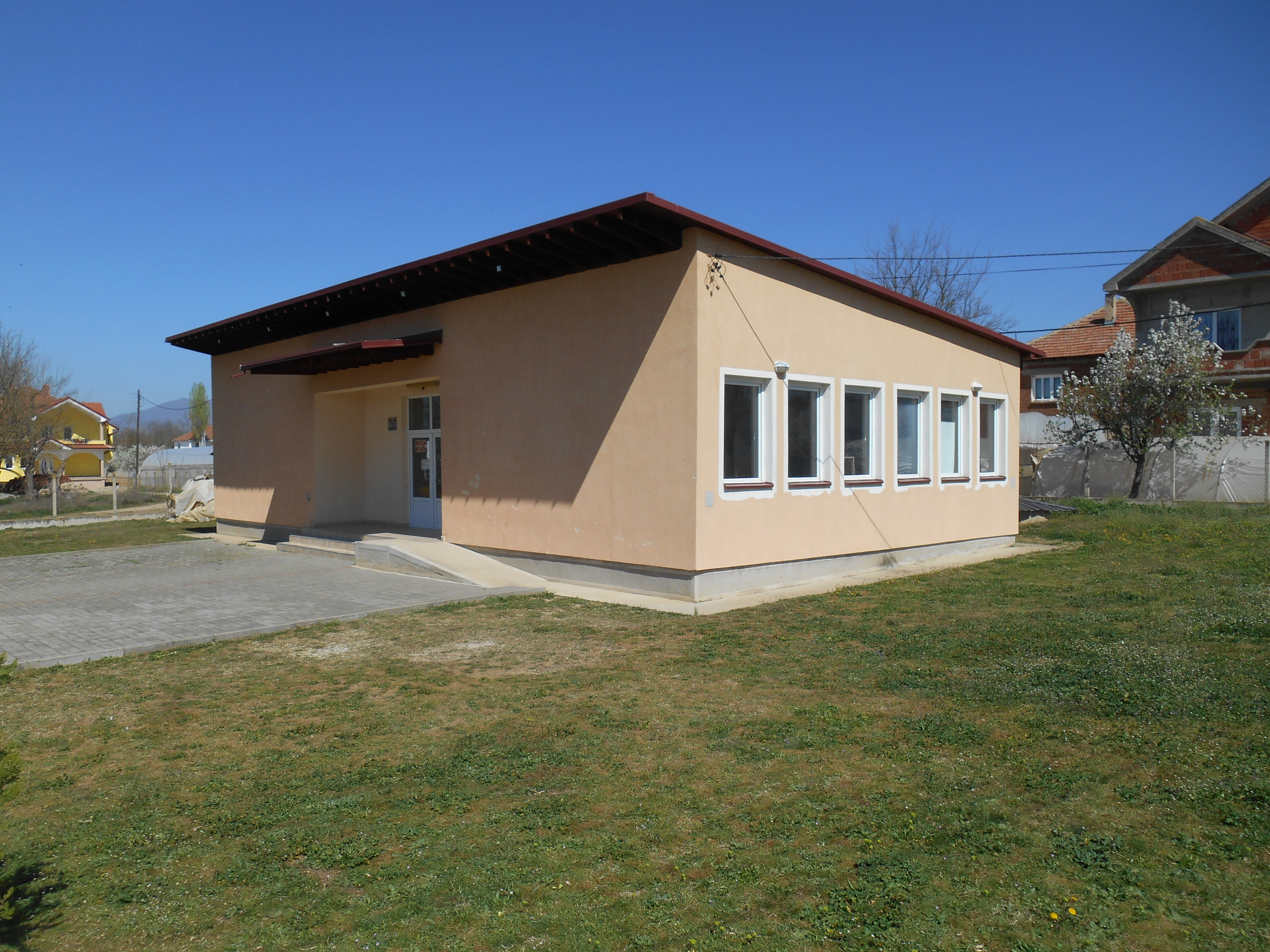 Основно училиште „Гоце Делчев“ - Гечерлија